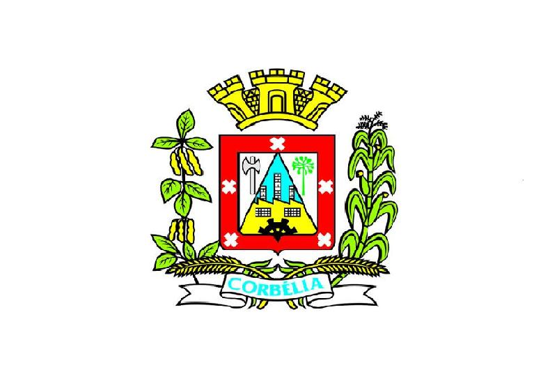 Bandeira de Corbélia